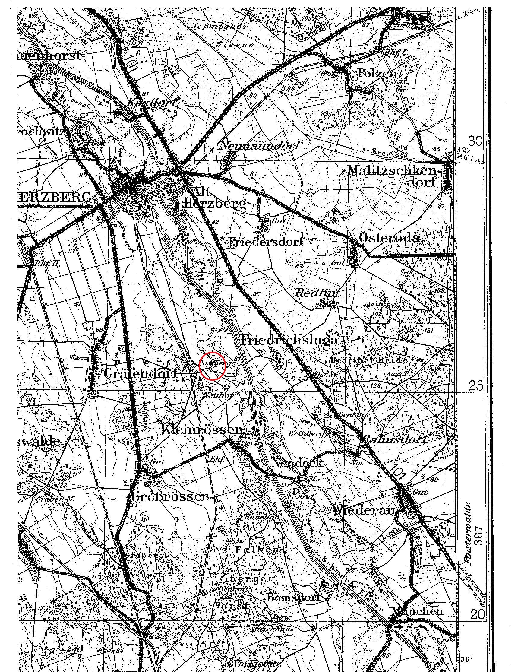 genaue Lager der ehemaligen Elstermühle Postberga